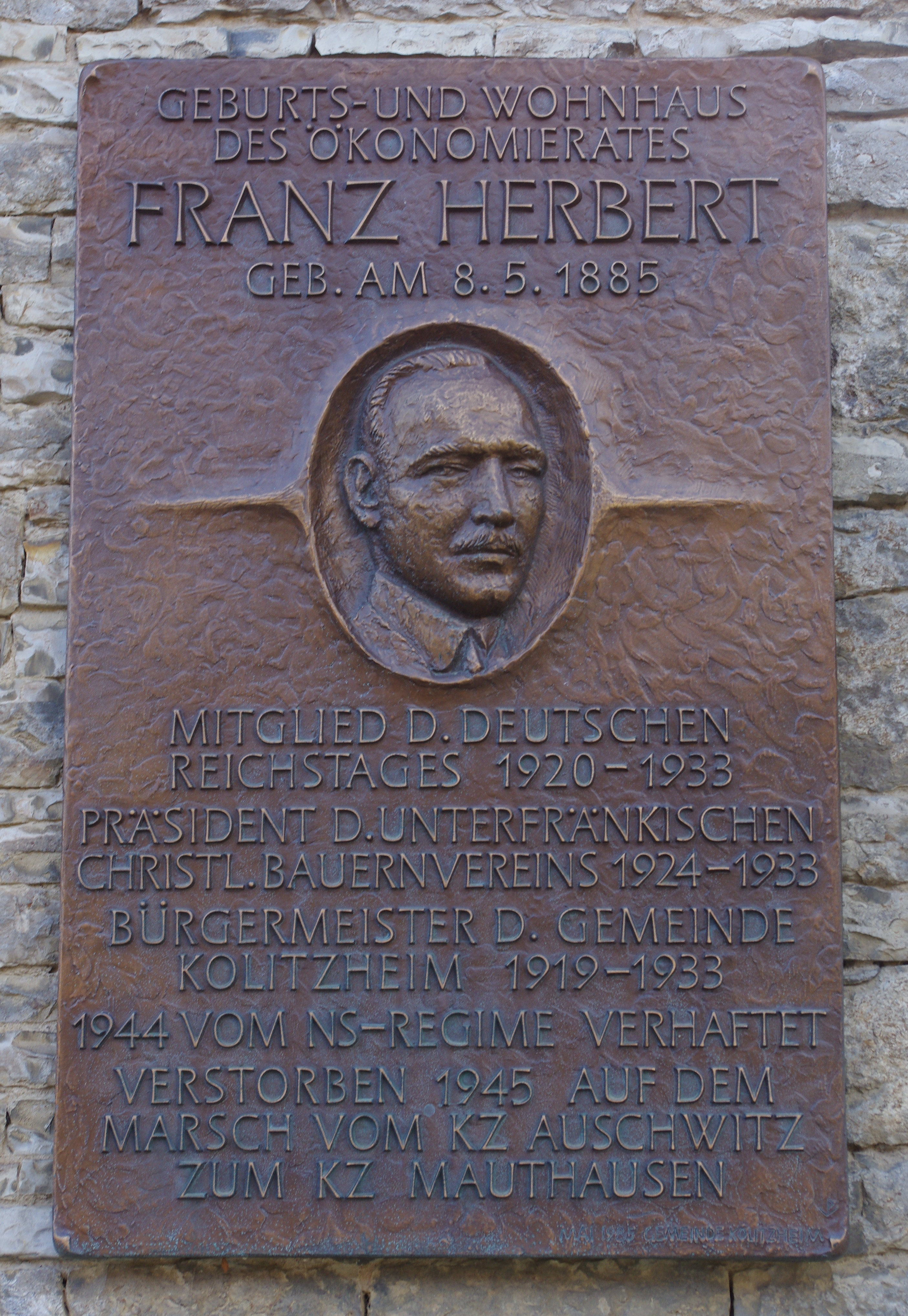 Lindacher Straße 1, Kolitzheim, Unterfranken, Deutschland